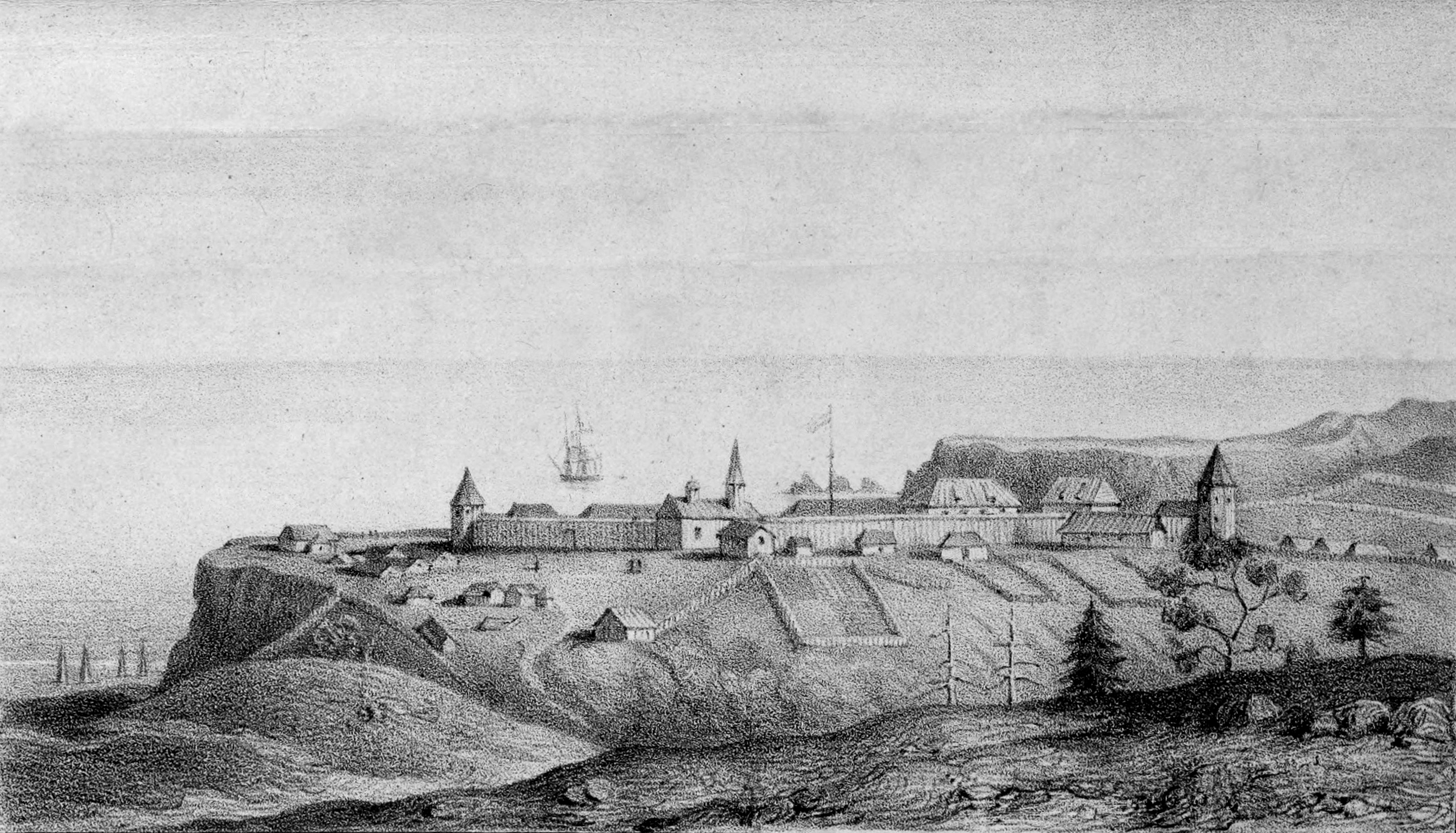 Vue de l’etablissement russe de la Bodega, à la Côte de la Nouvelle Albion, en 1828